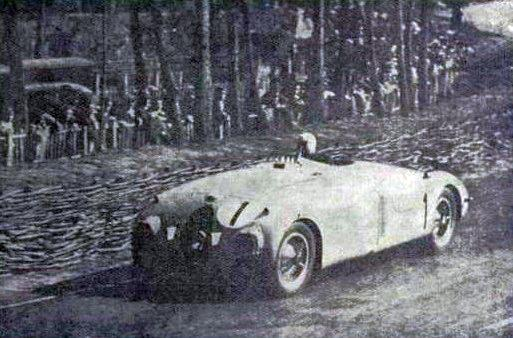 Jean-Pierre Wimille durant les 24 Heures du Mans 1939.